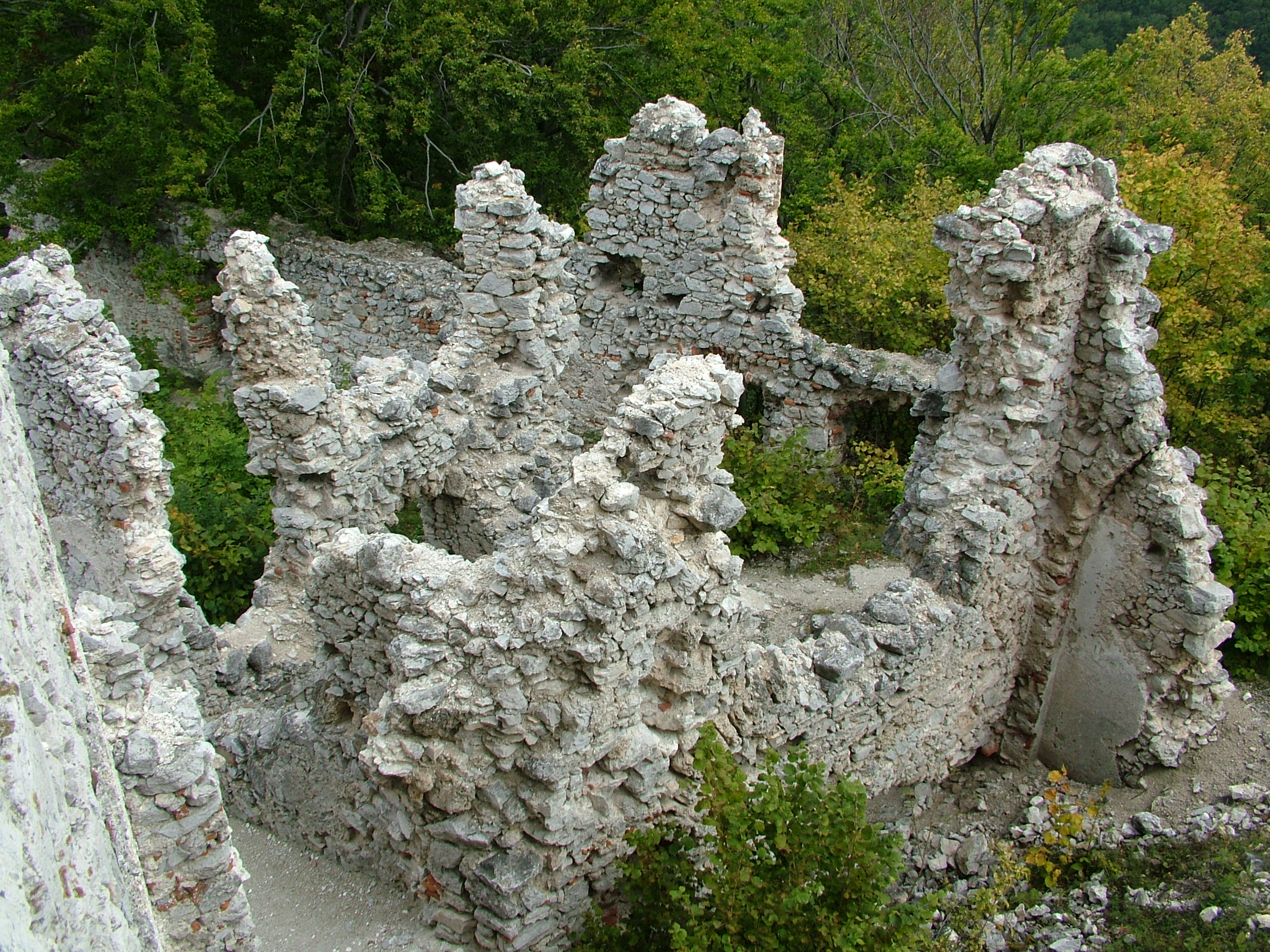 Hrad Tematín